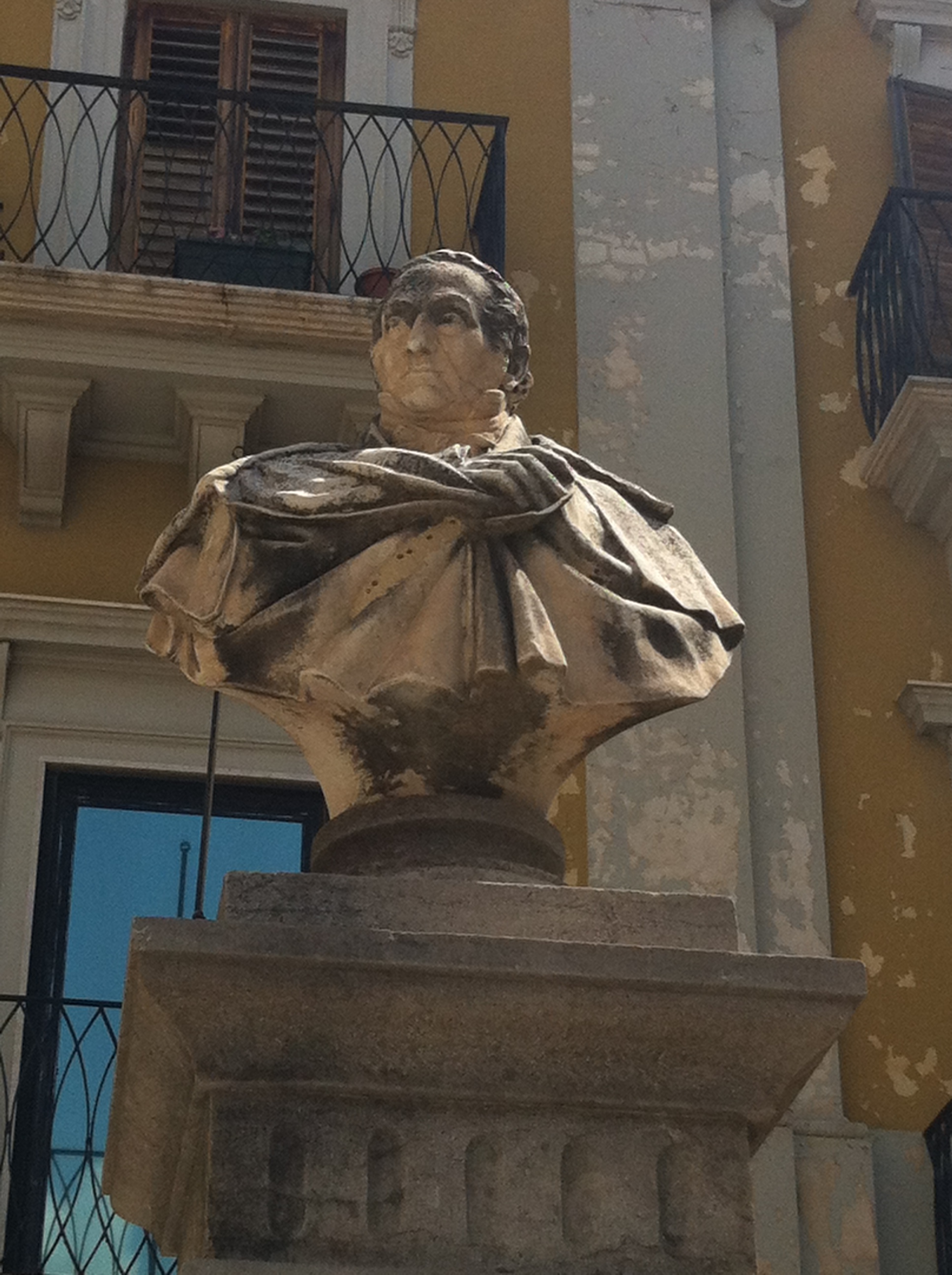 Monumento a Mauro Tumminelli a Caltanissetta